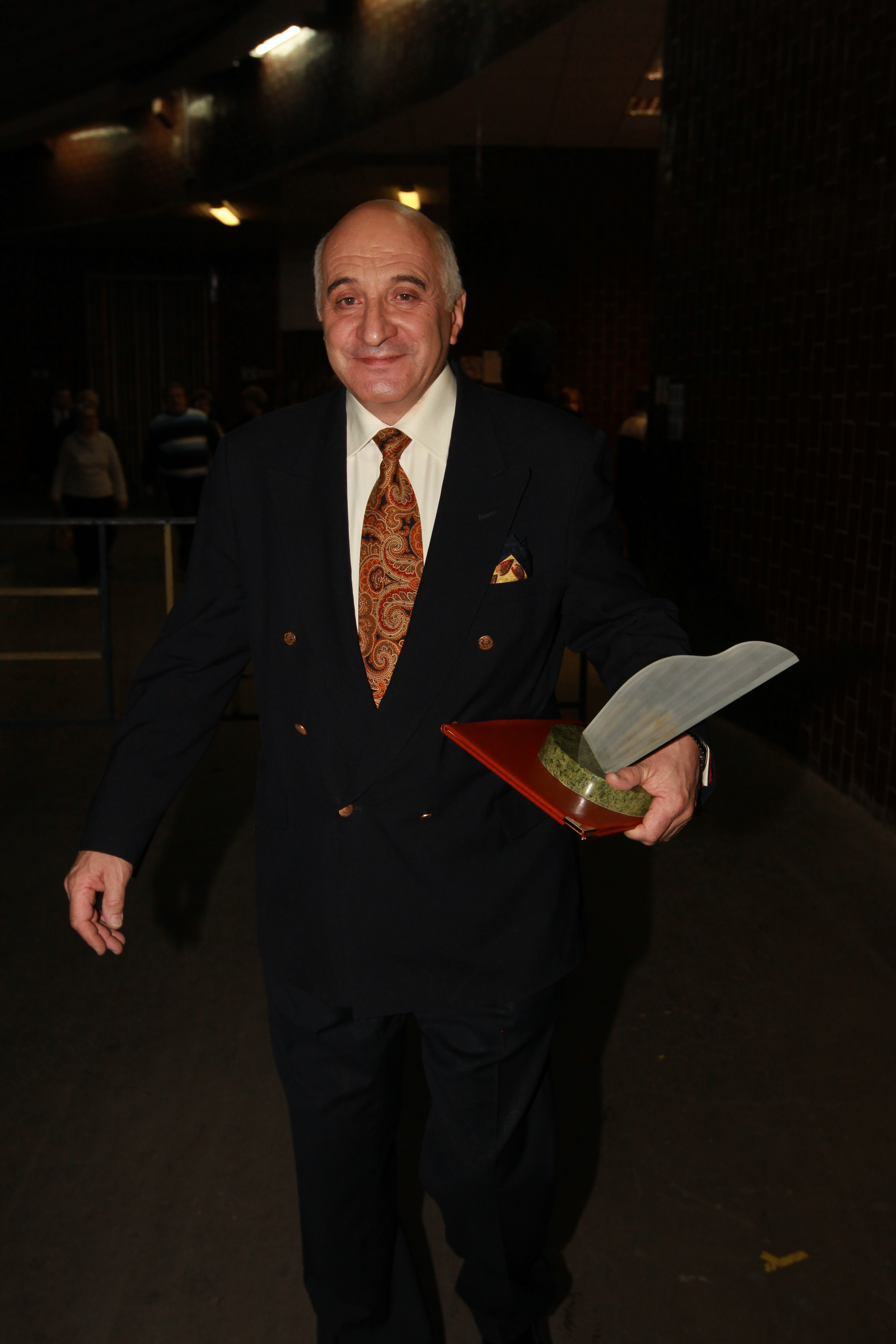 Леонид Фадеев. Поэт-песенник. Премия "Песня Года".